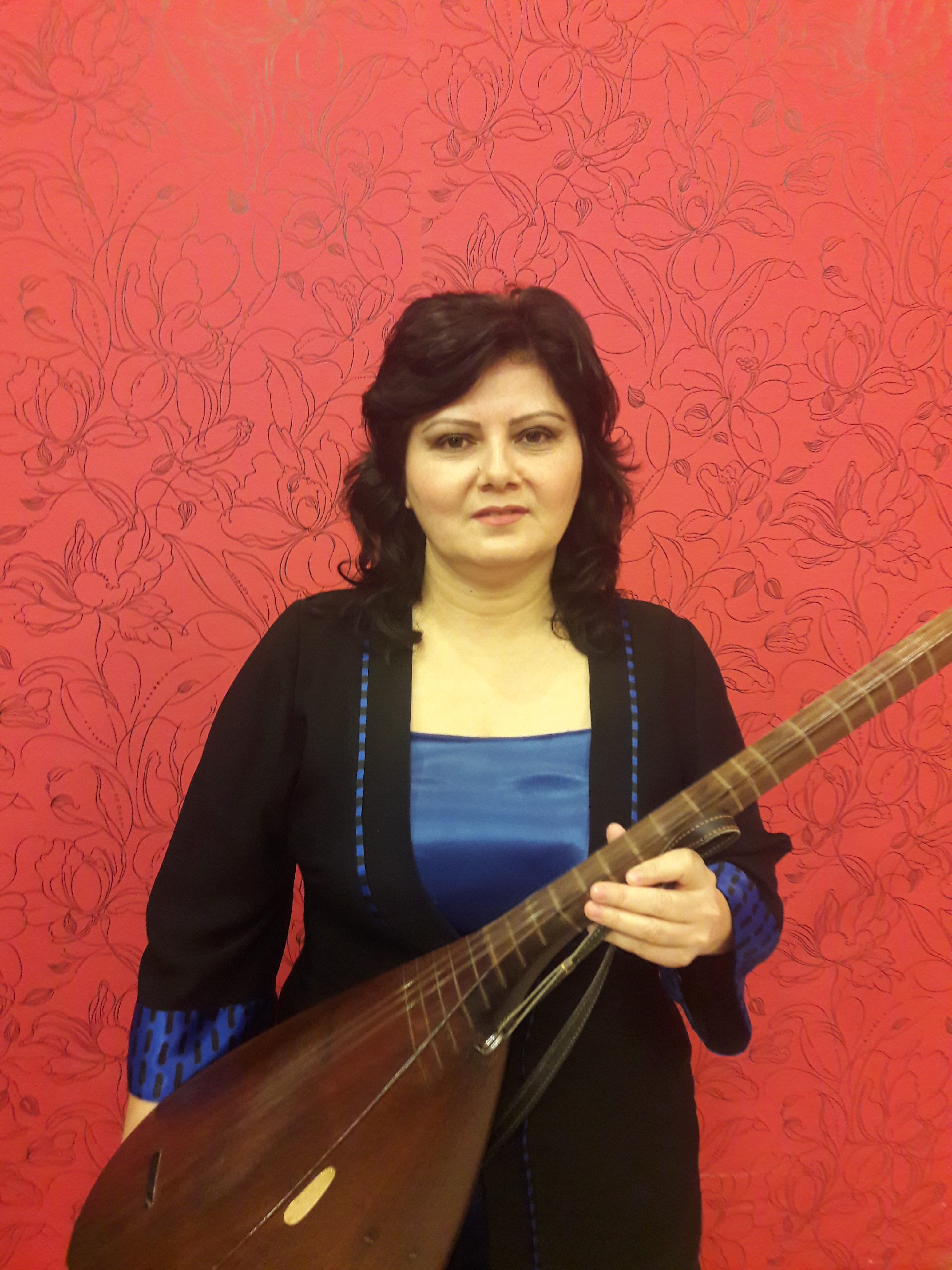 Aşıq Zülfiyyə